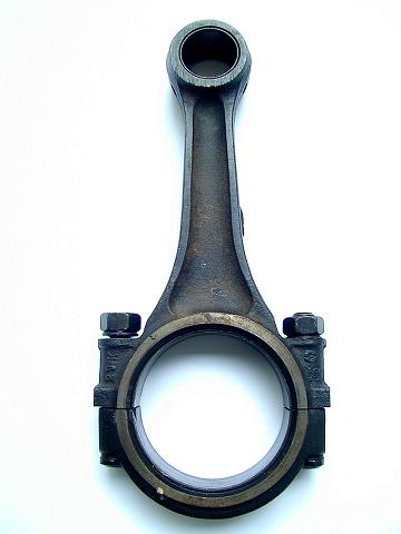 Pleuel eines VW-Käfer.